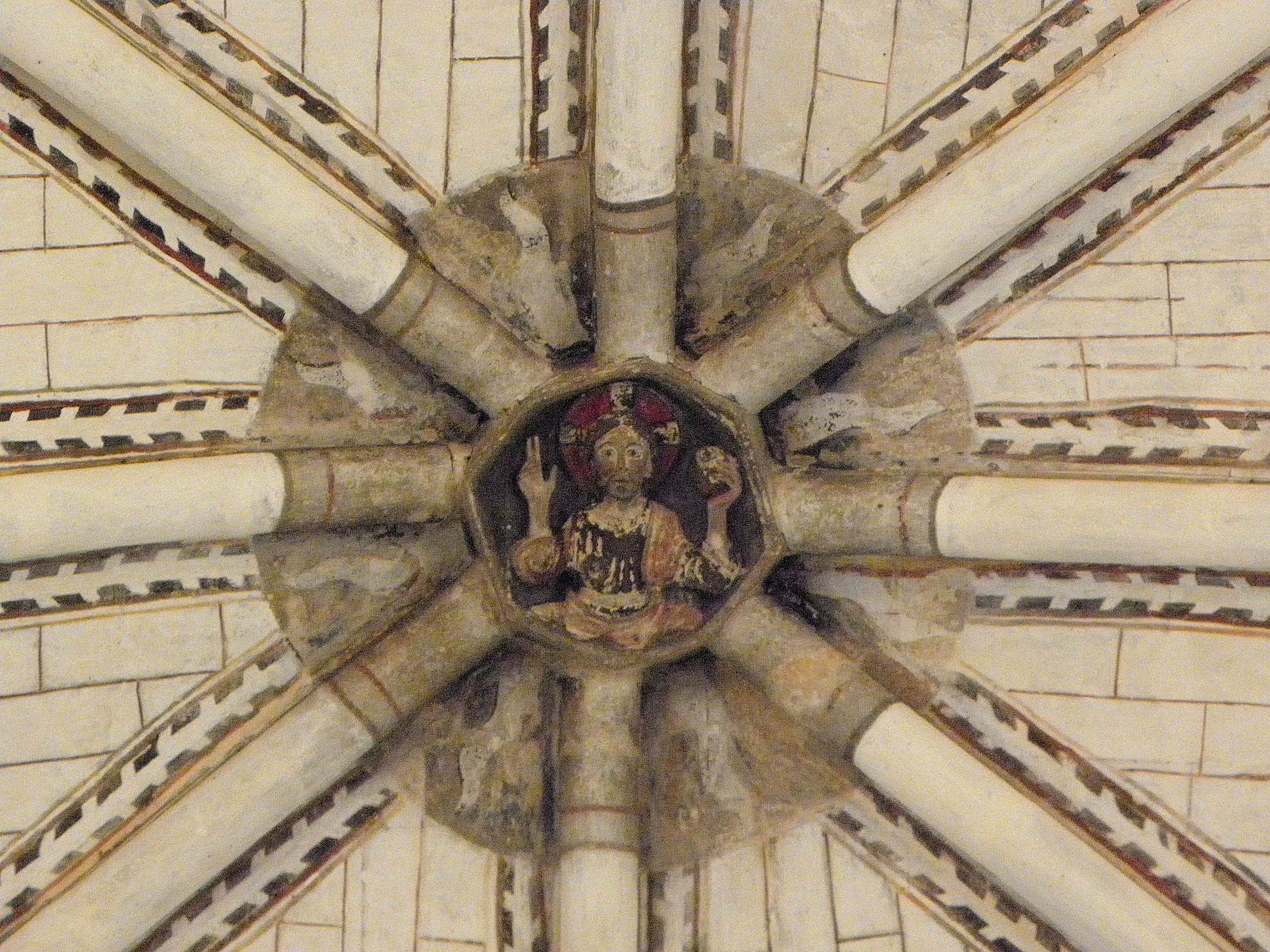 Église Saint-Denis de Pontigné (49). Intérieur. Voûtes du chœur. Clef principale. Christ bénissant.